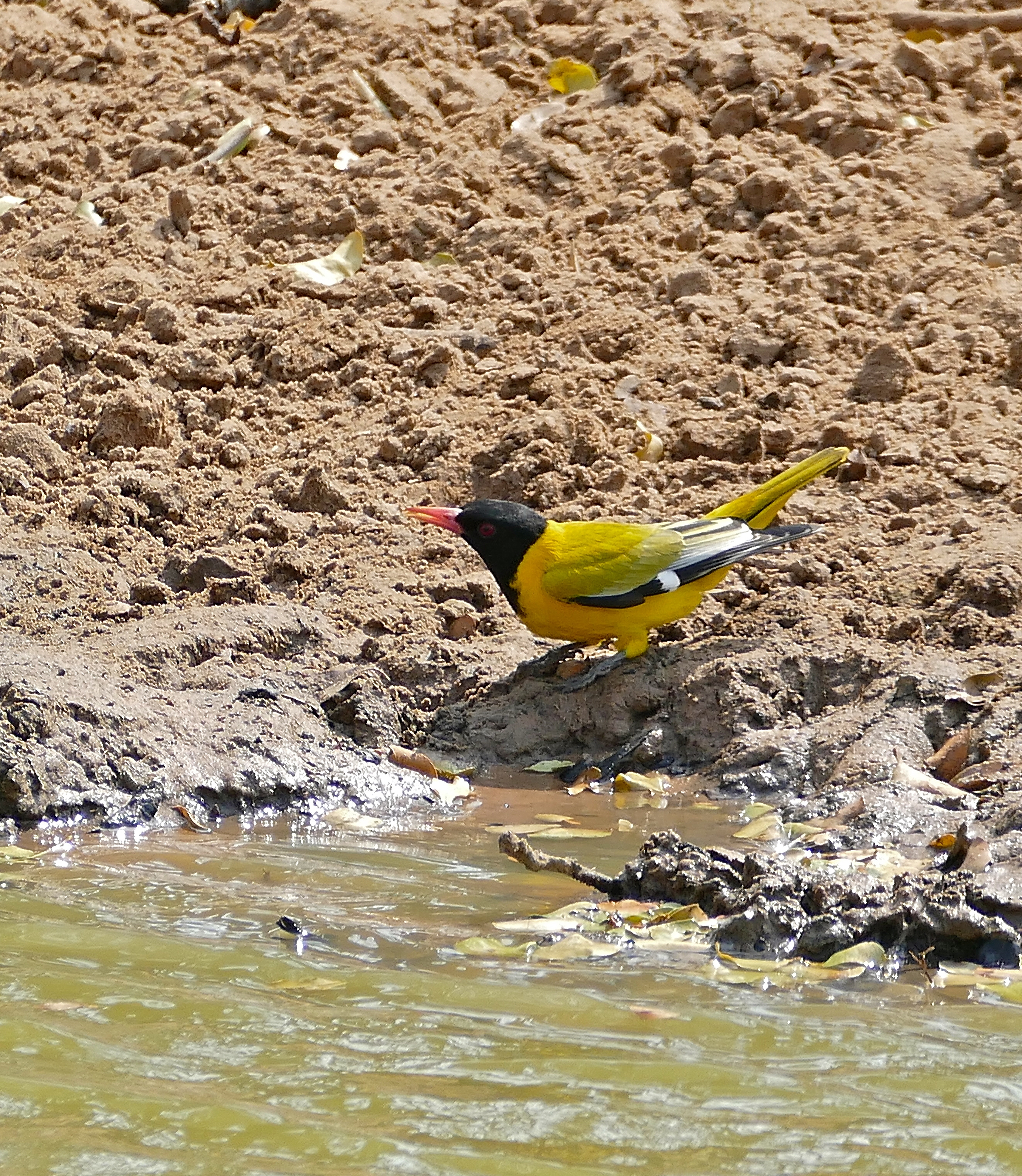 kuMasinga Hide, uMkhuze Game Reserve, Kwazulu-Natal, SOUTH AFRICA